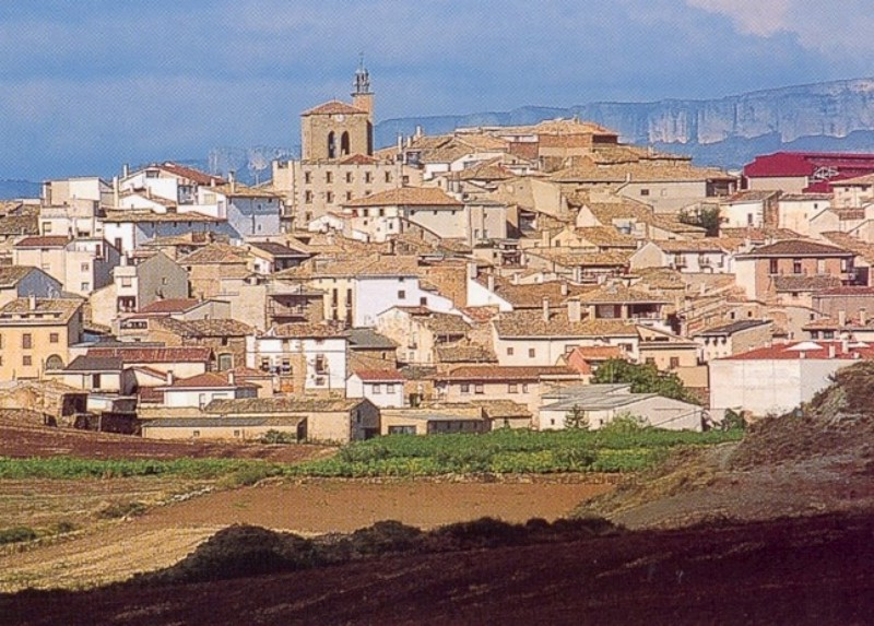 Date du cliché : septembre 2001.